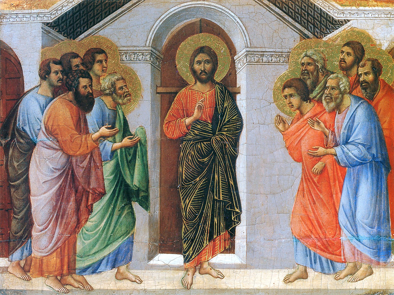 Duccio_Maesta_detail2.jpg